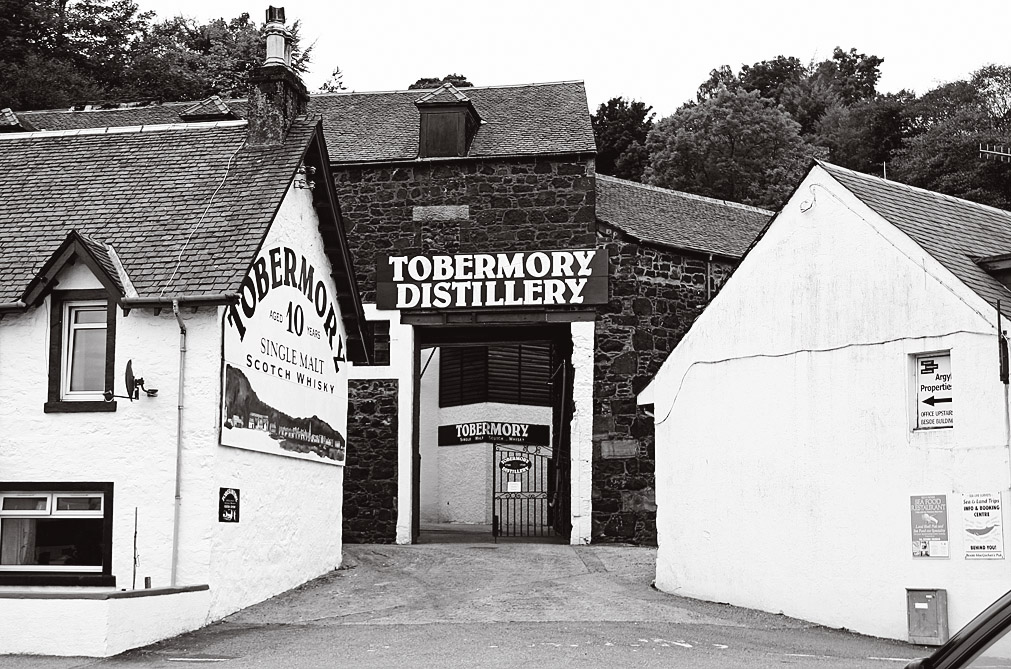 La distillerie Tobermory, sur l'île de Mull, en Écosse. Photo : Martin Burns. Licence Creative Commons.